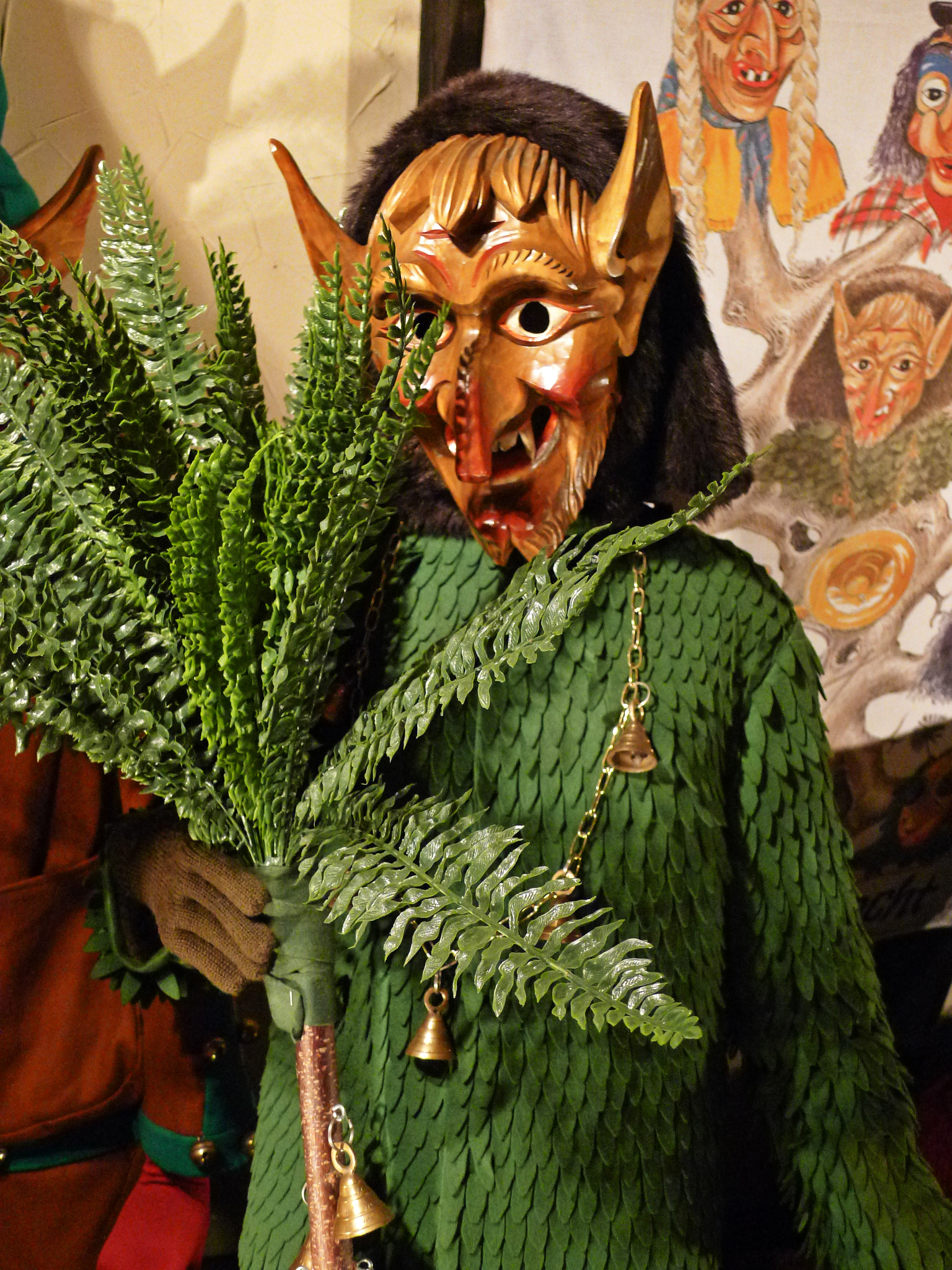 Buchsgeist - Häsfigur der Narrenzunft Rolli-Dudel e.V. Wyhlen, hier in der Oberrheinischen Narrenschau Kenzingen ausgestellt